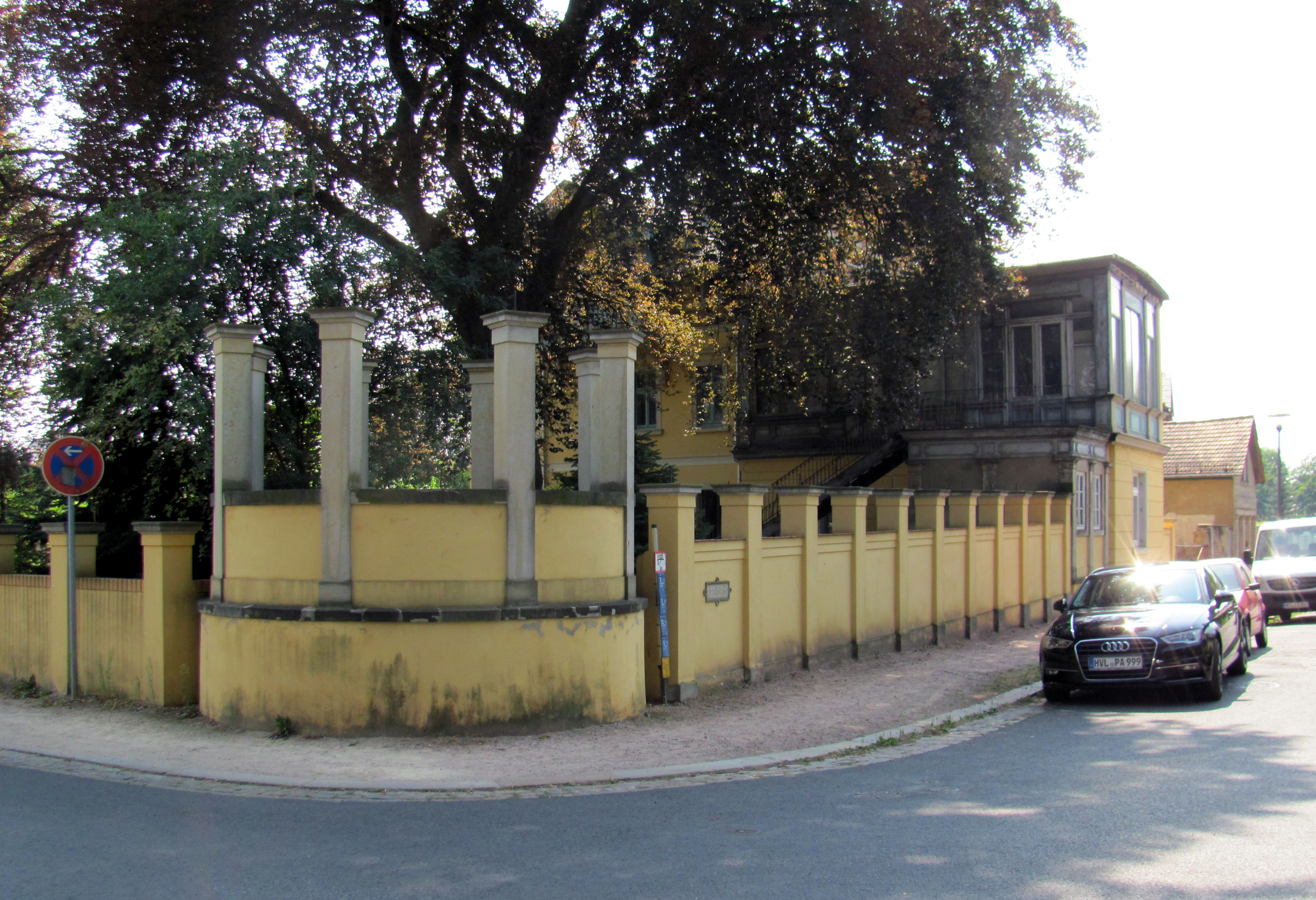 Radebeul-Serkowitz, Geschäftslokal Gebrüder Ziller, Ateliersaal